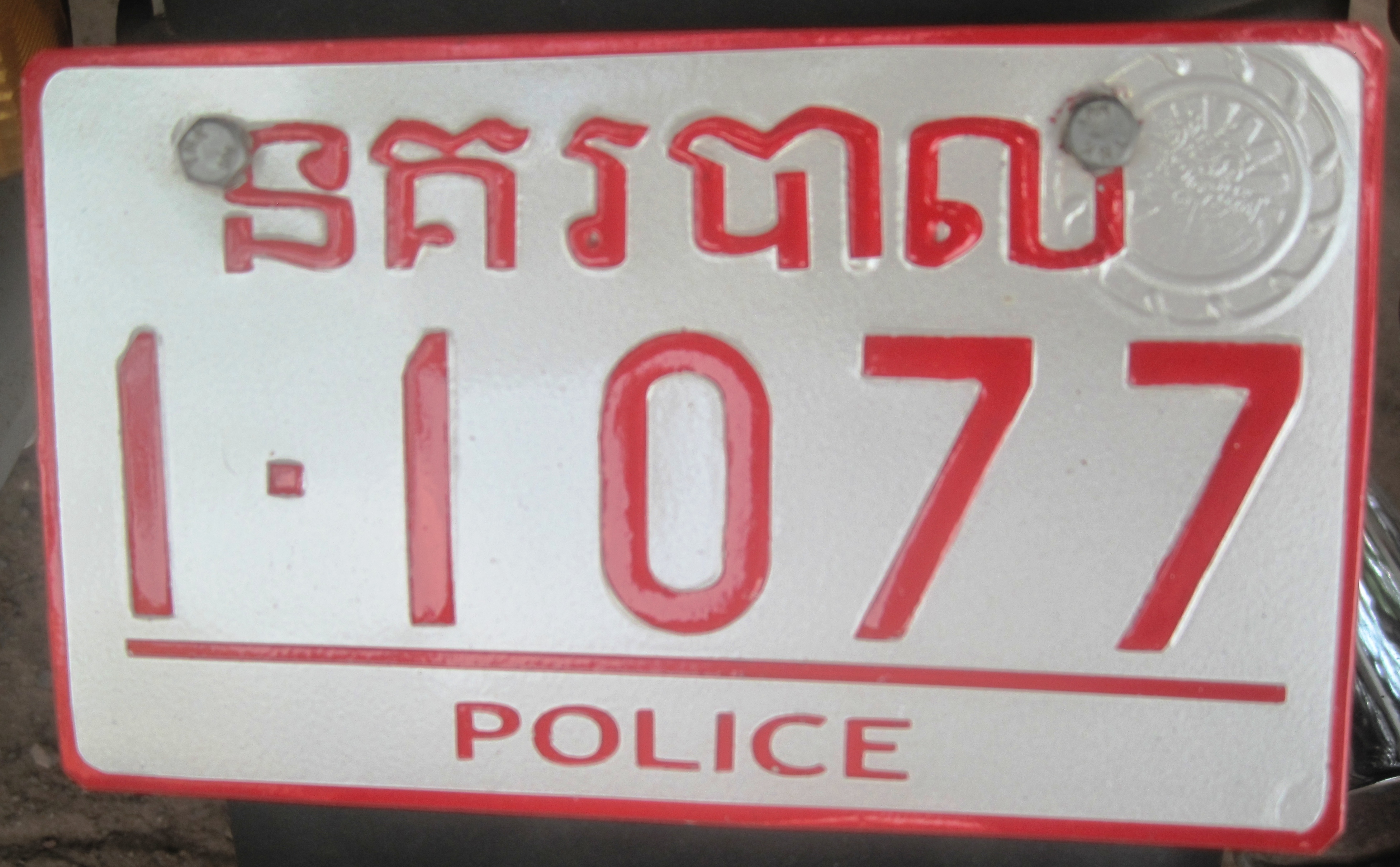 Politie kentekenplaat Cambodja